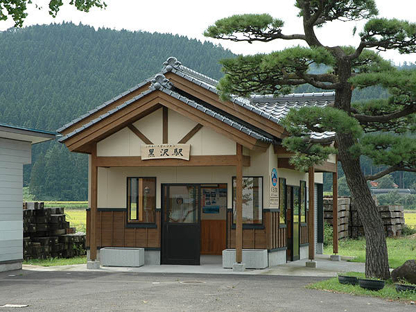 Kurosawa Station, on Yuri Kōgen Railway, Yurihonjō, Akita, Japan